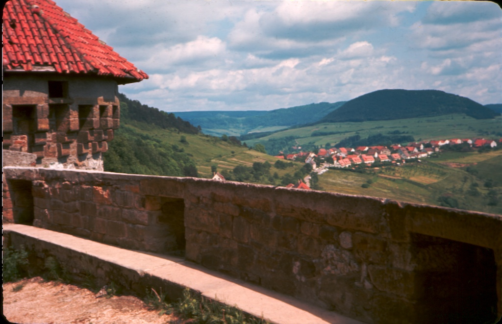 Countryside (Rehgebirge) near Schwabisch Gmund viewed from old castle Rechberg